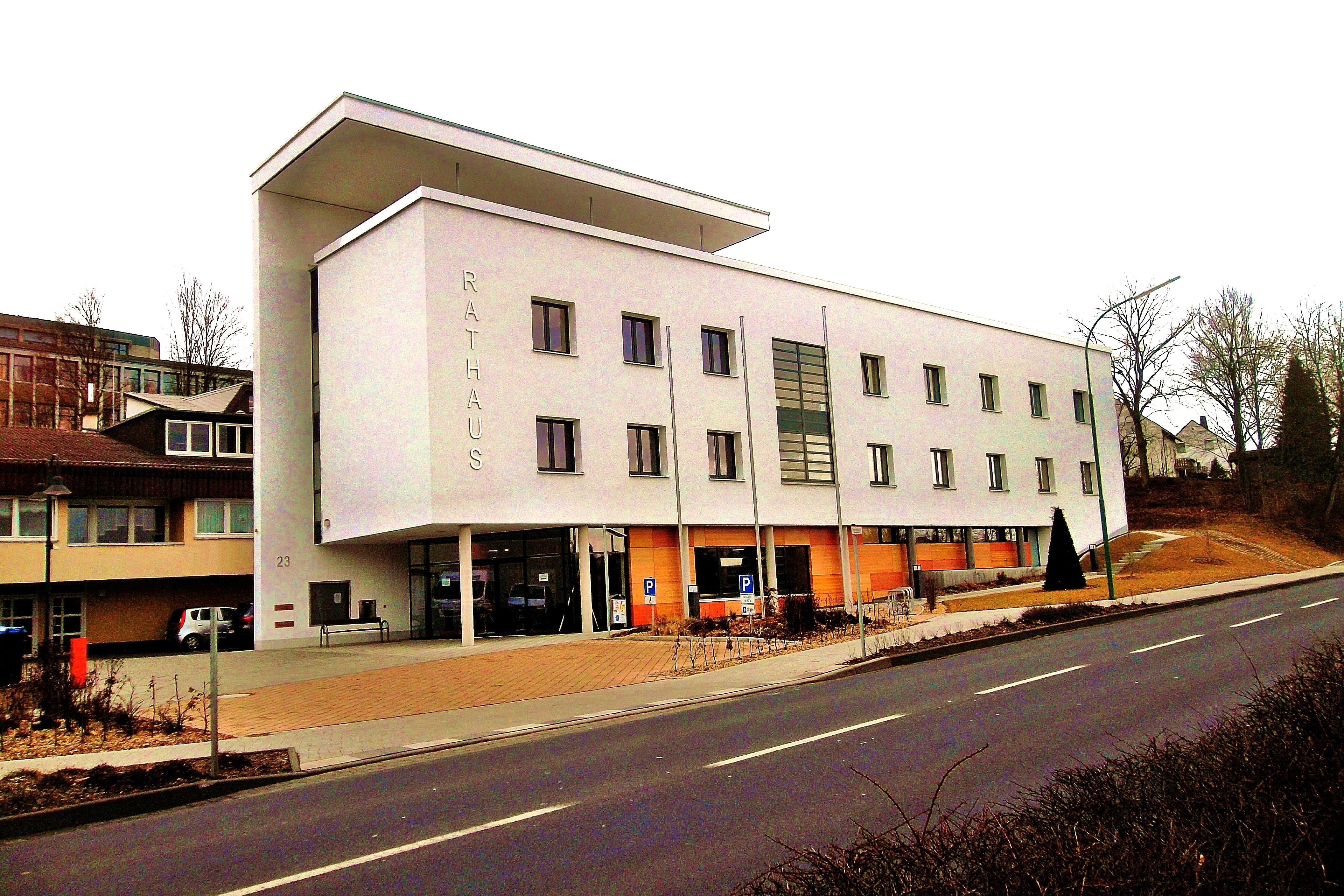 𐌲𐌿𐍄𐌹𐍃𐌺: Künzell